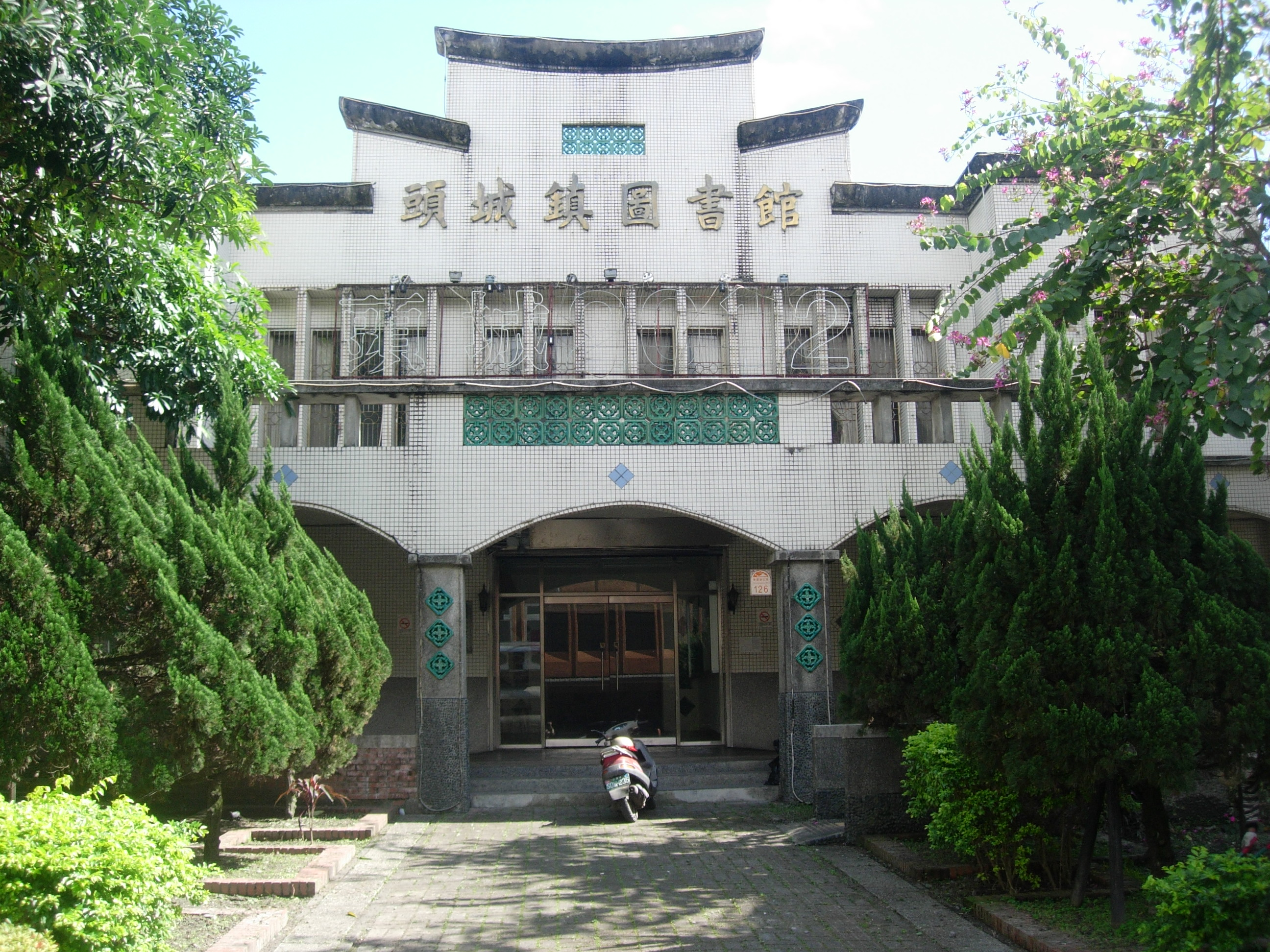 中文（台灣）: 頭城舊圖書館，原為大千戲院